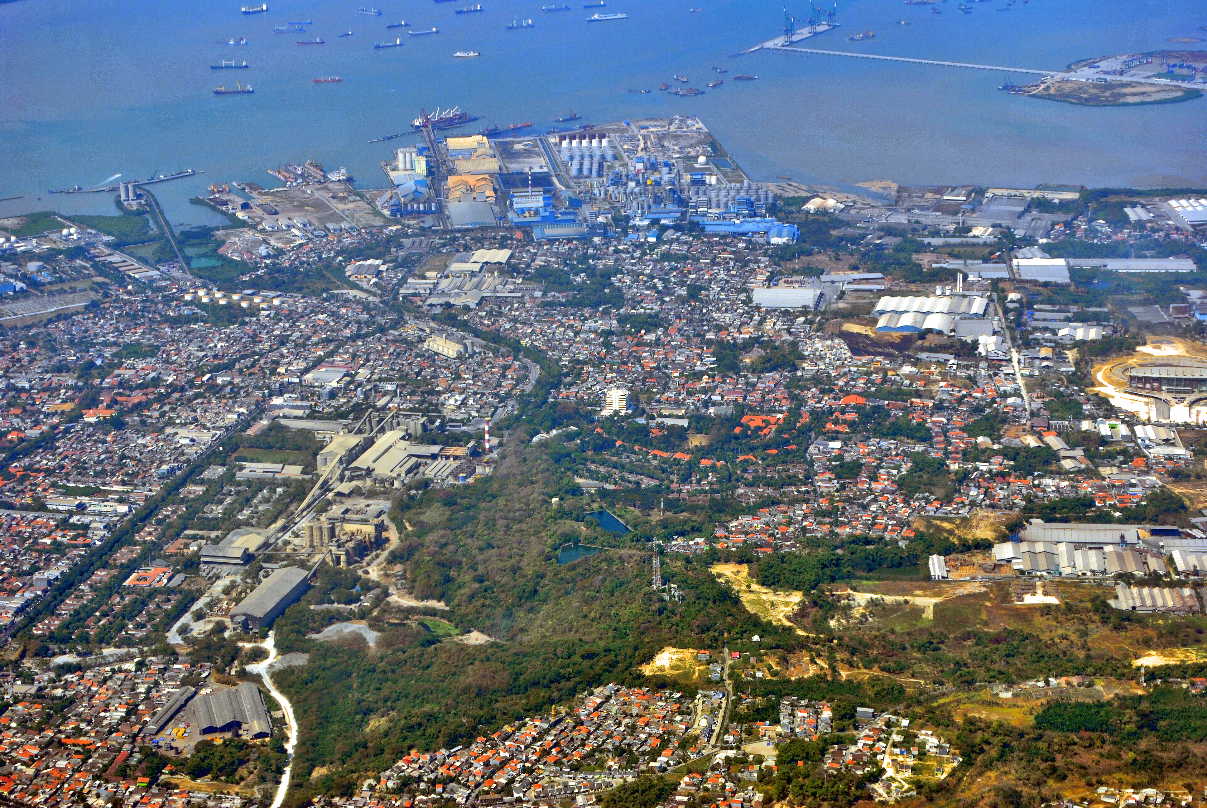 Gresik